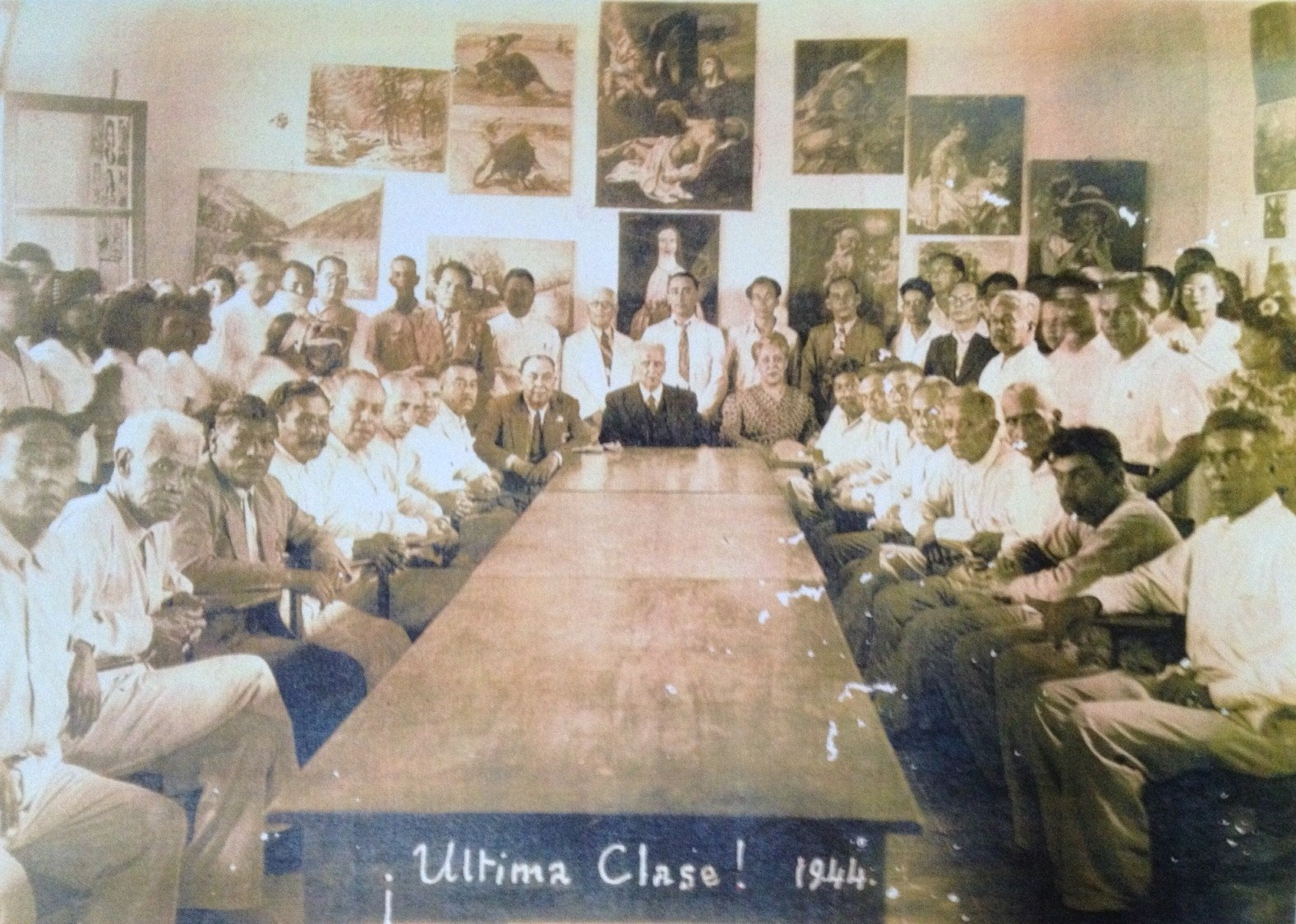 Ultima clase del Prof. Donato Márquez Azuara en compañía de: José de Jesús Núñez y Domínguez, Lic. Agapito Pérez Fontecilla, Dr. José Buil Belenguer, Dr. Ricardo Olivo Lara, Carlos Vidal García, Raul del Cueto Decuir, Bartolome Tognola Zardoni, entre otros.